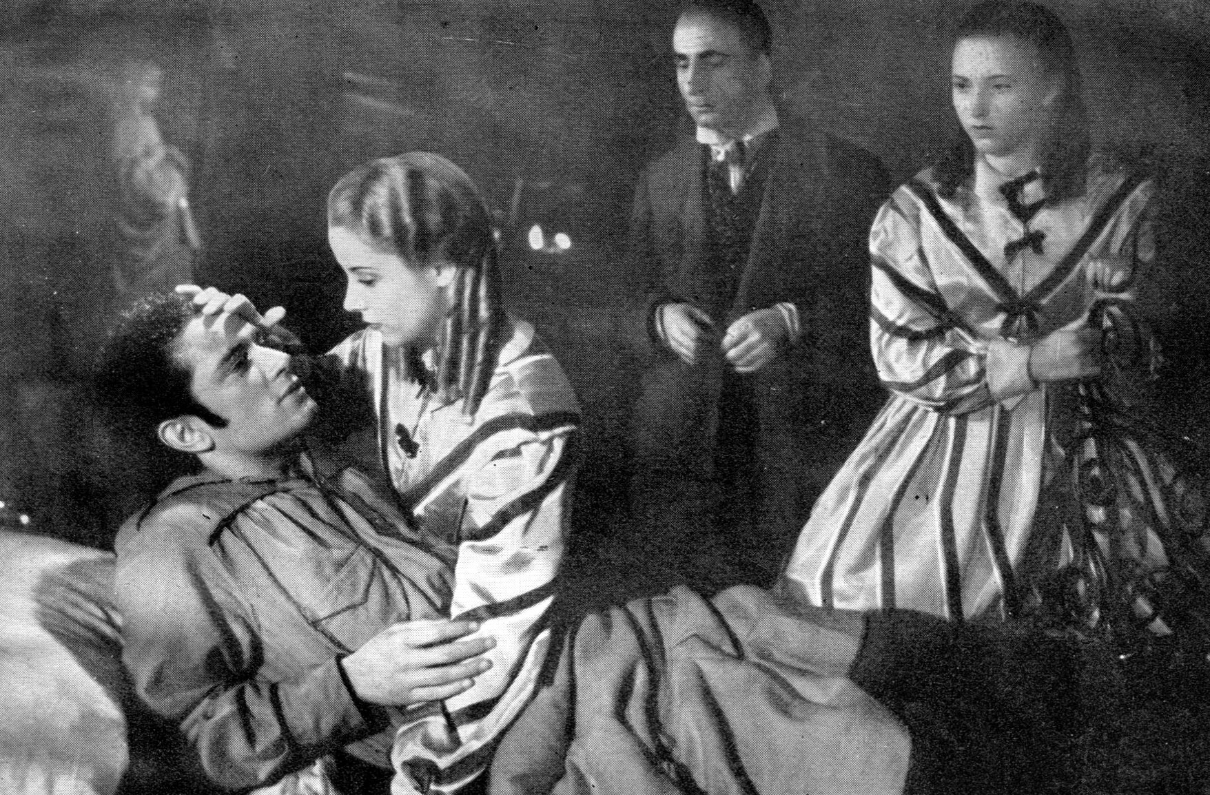 Leonardo Cortese. Maria Mercader, Fausto Guerzoni e Carla Del Poggio in Un garibaldino al convento ( De Sica, 1942)